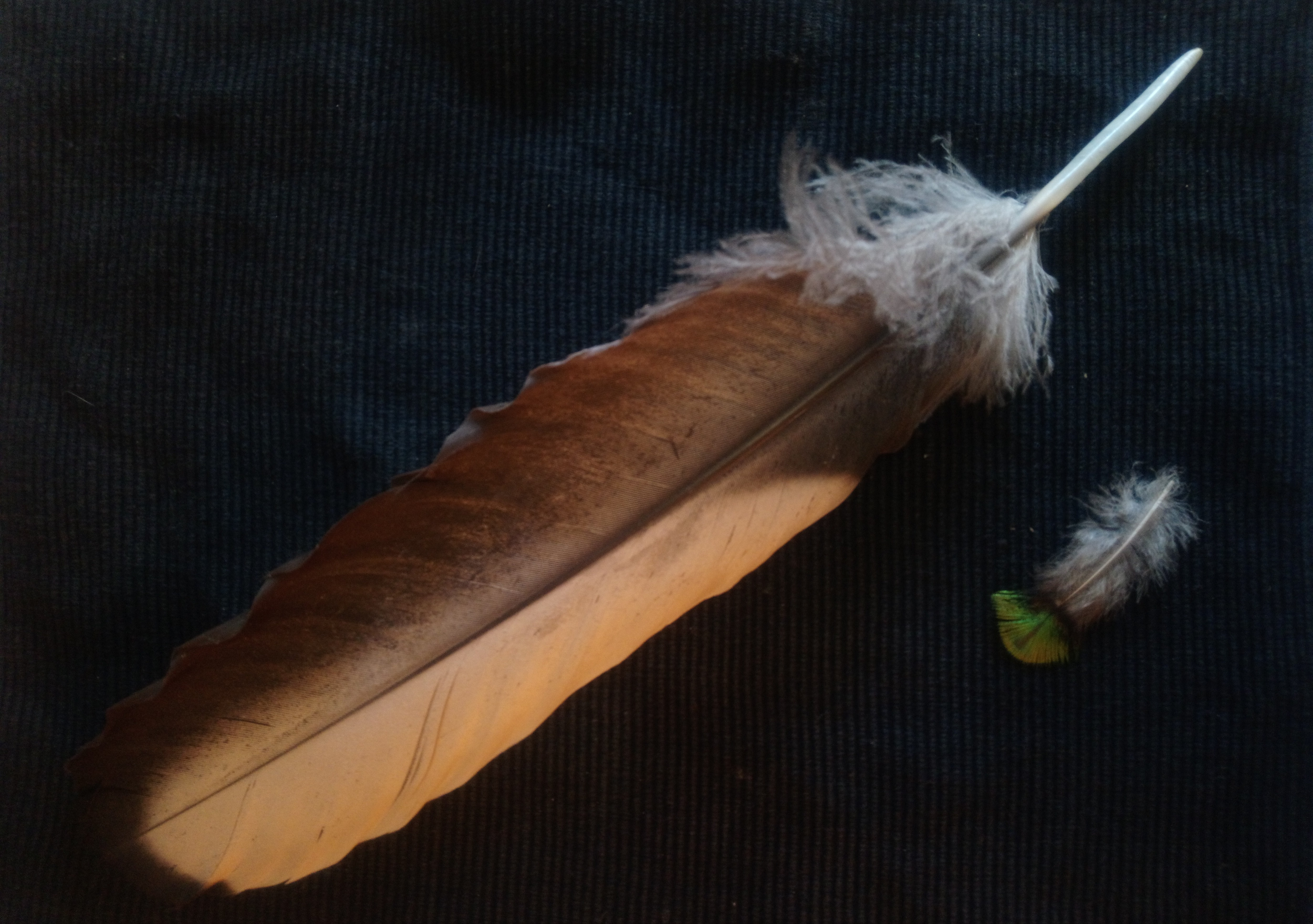 Pluma de cóndor andino junto a pluma de pavo real